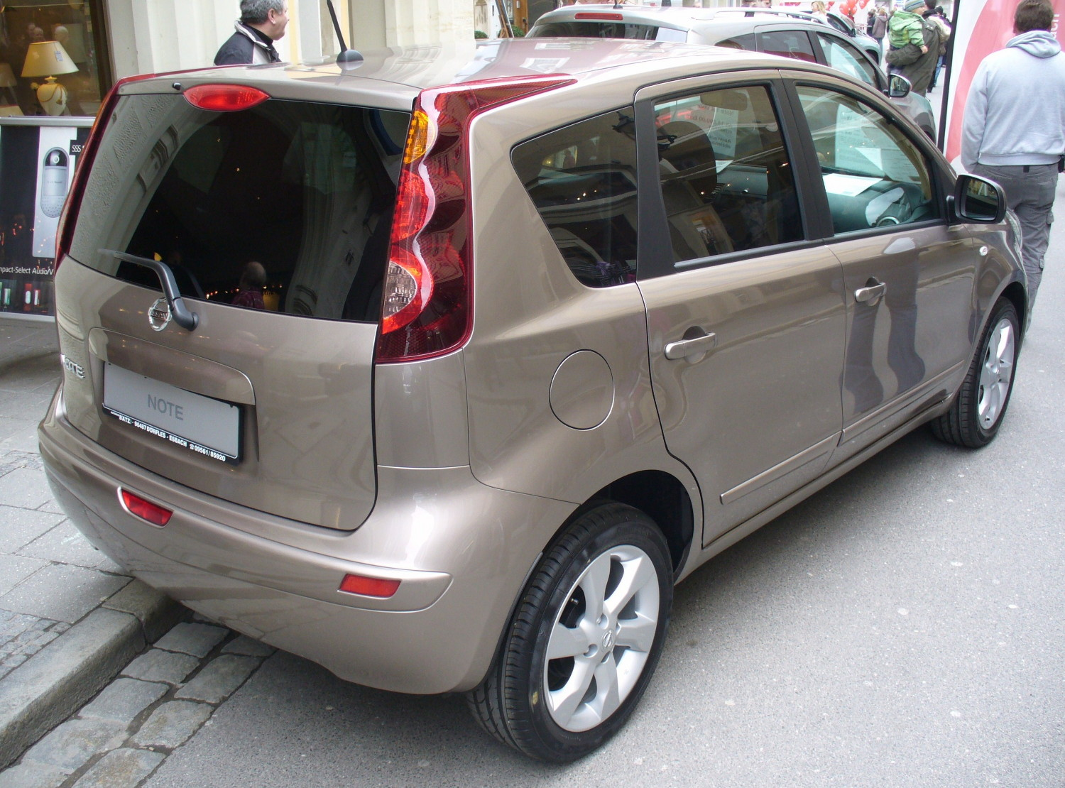 Nissan Note